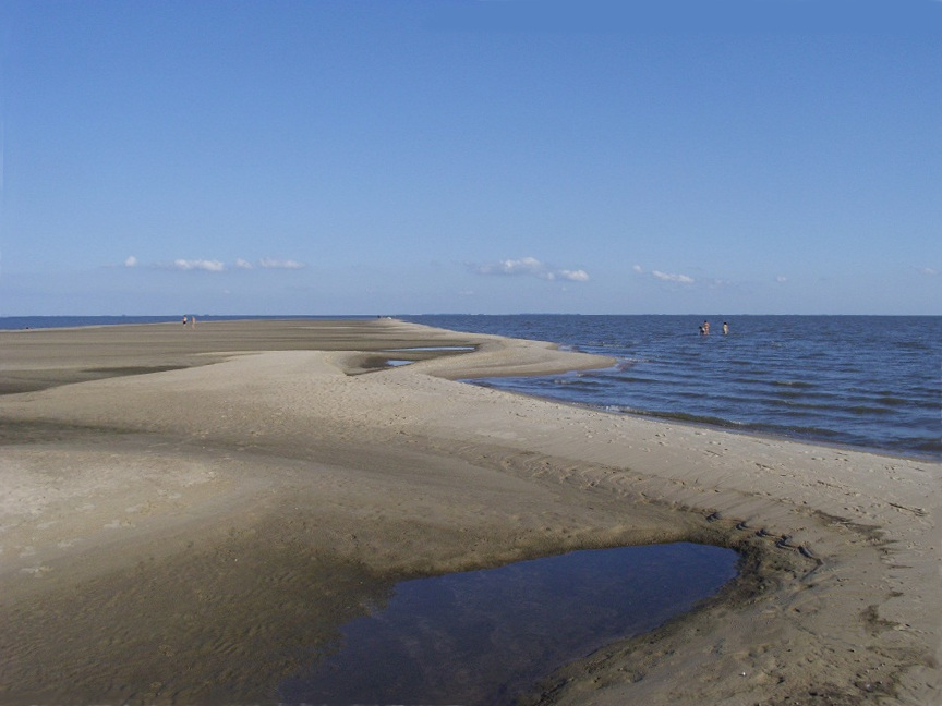 Lengua